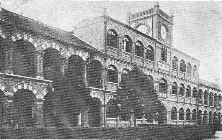 南京高等师范学校（东南大学）一字房